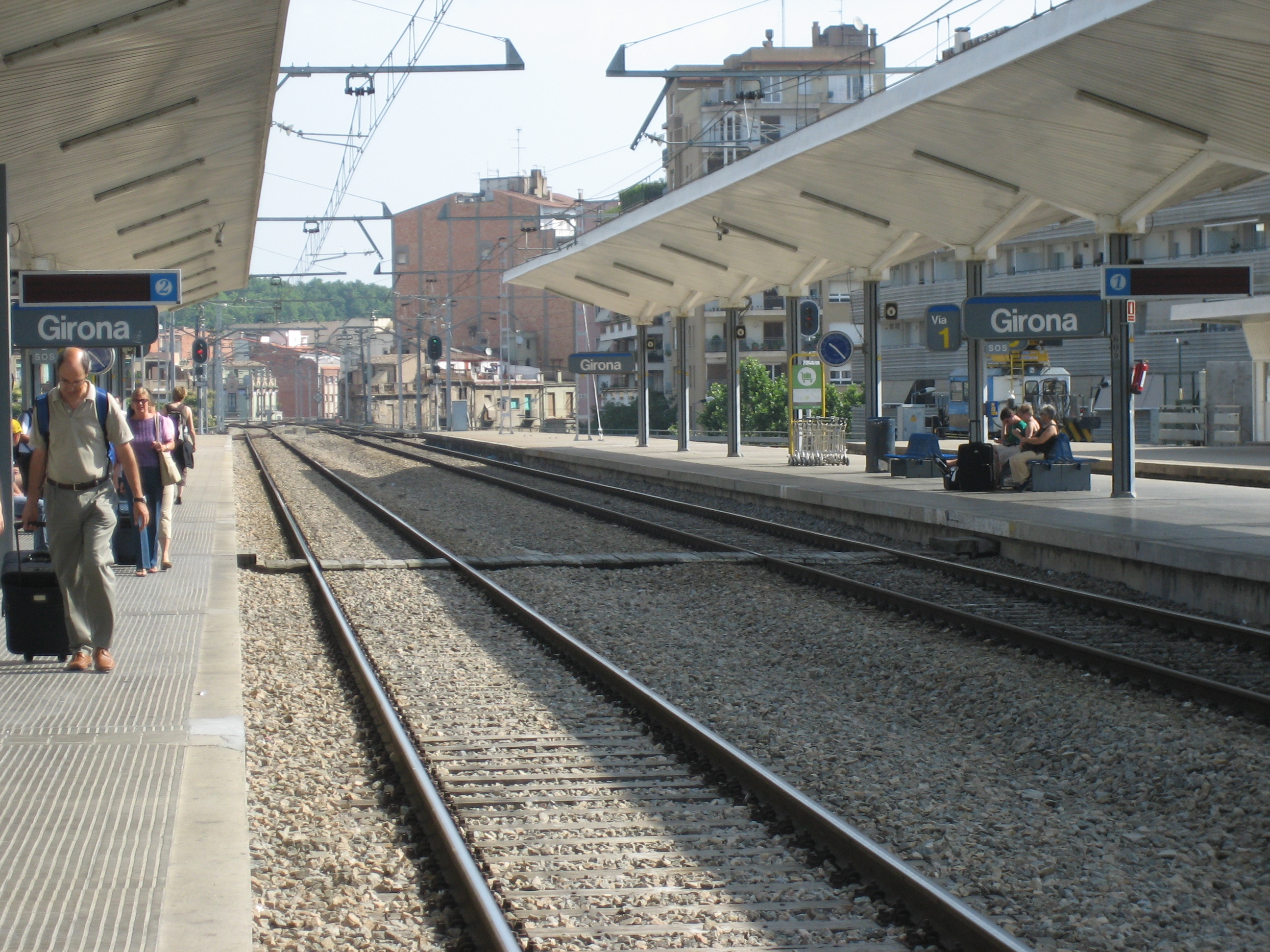 Andana de l'estació del ferrocarril de Girona, direcció Figueres.